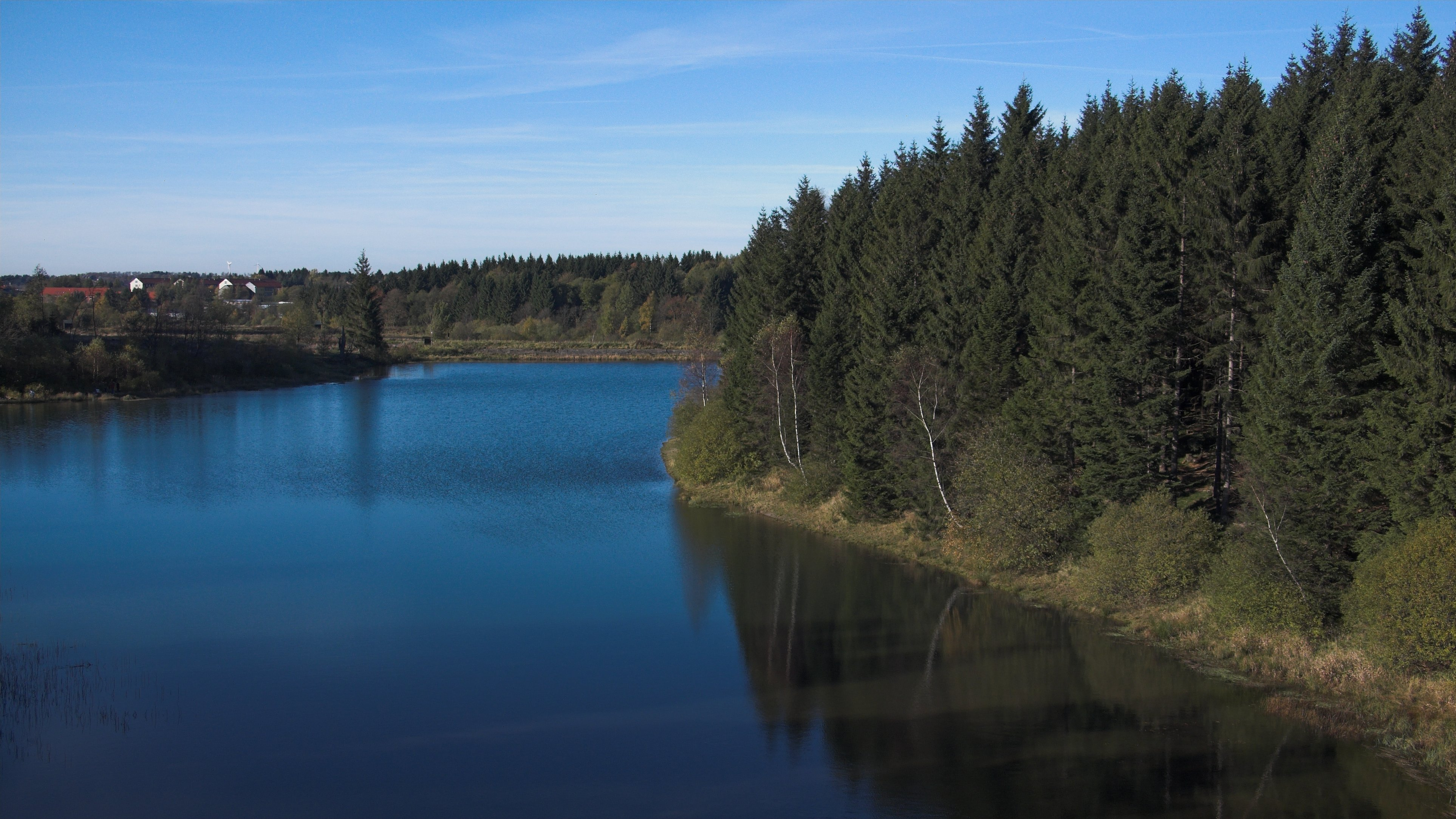 Blick auf den Oberen Pfauenteich von der Dammkrone des Hirschler Teiches